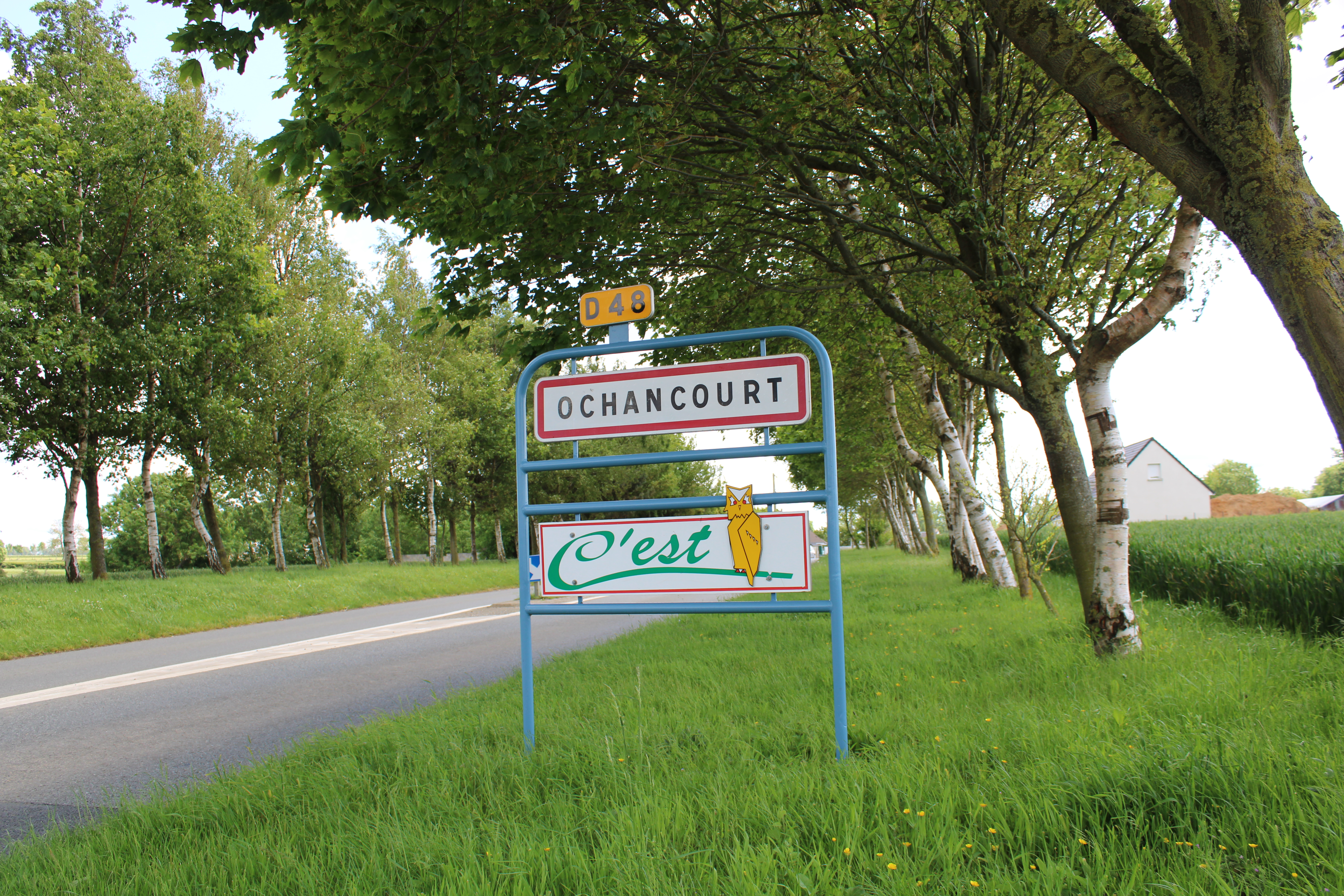 Entrée du village